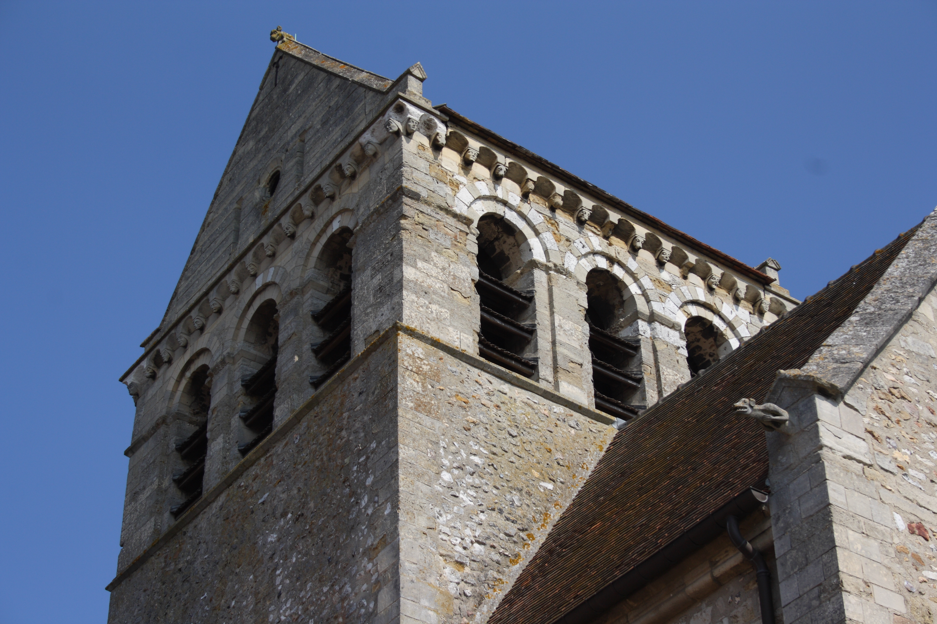 Kirche Sainte-Anne in Gassicourt, einem Stadtteil von Mantes-la-Jolie im Département Yvelines (Île de France), romanischer Glockenturm